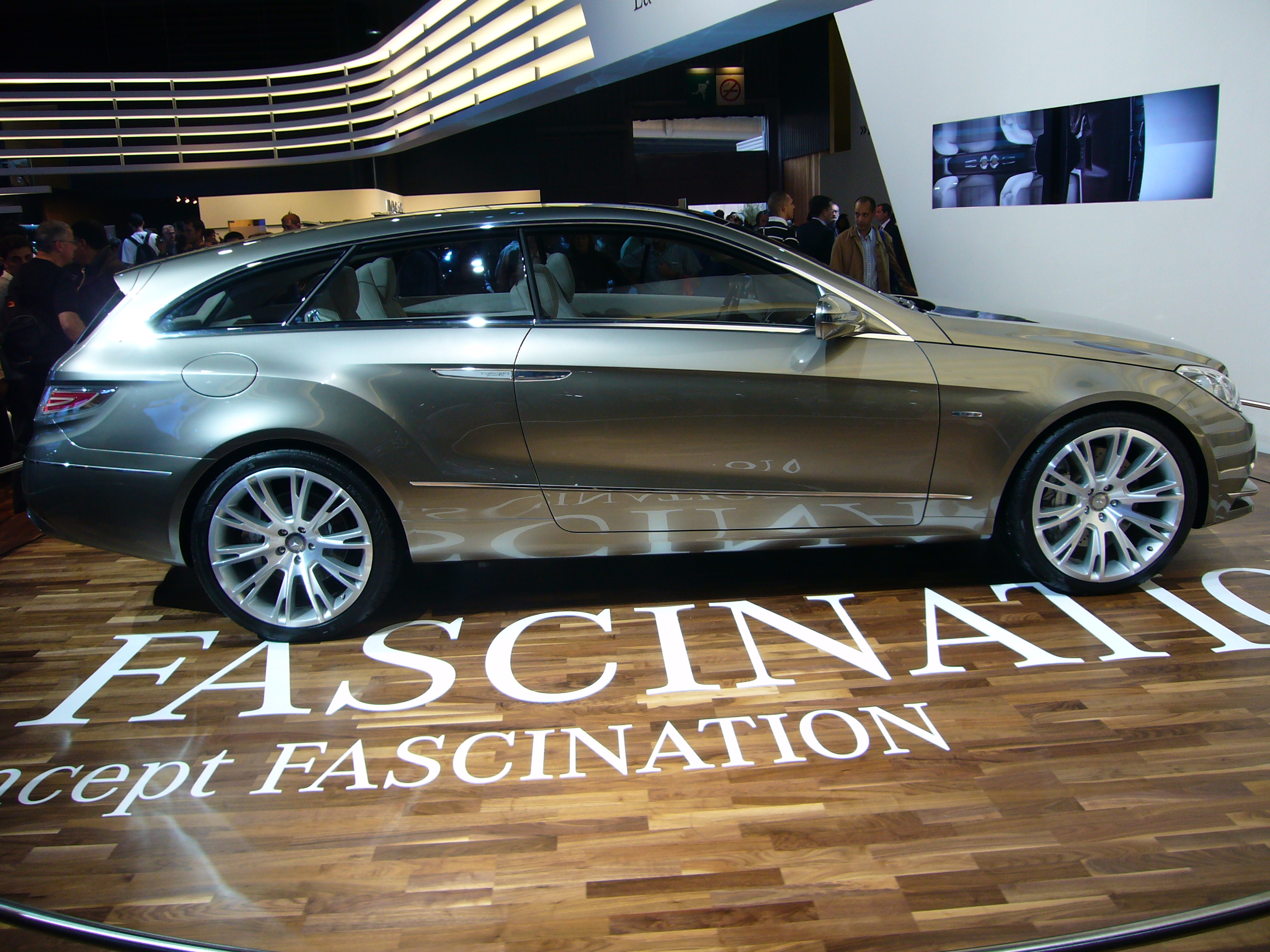 Mondial de l'Automobile Paris 2008